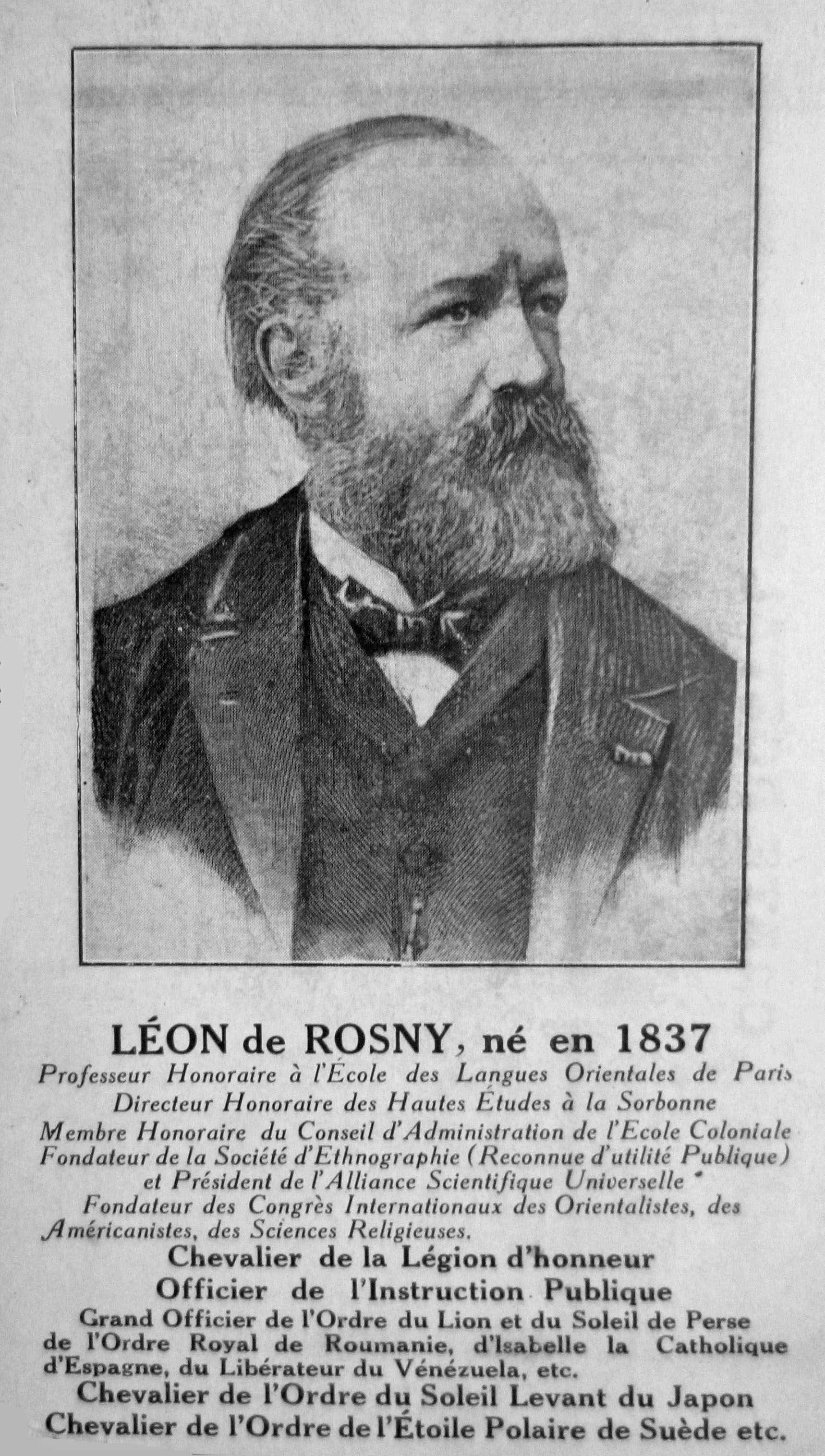 Photo d'une gravure N/B (ca 1895) ; format 7x13 cm ; portrait de Léon de Rosny ; Titres et distinctions